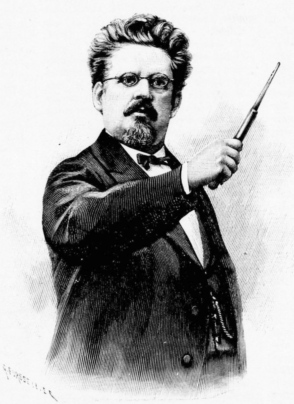 Oskar Arpi (1824-1890)